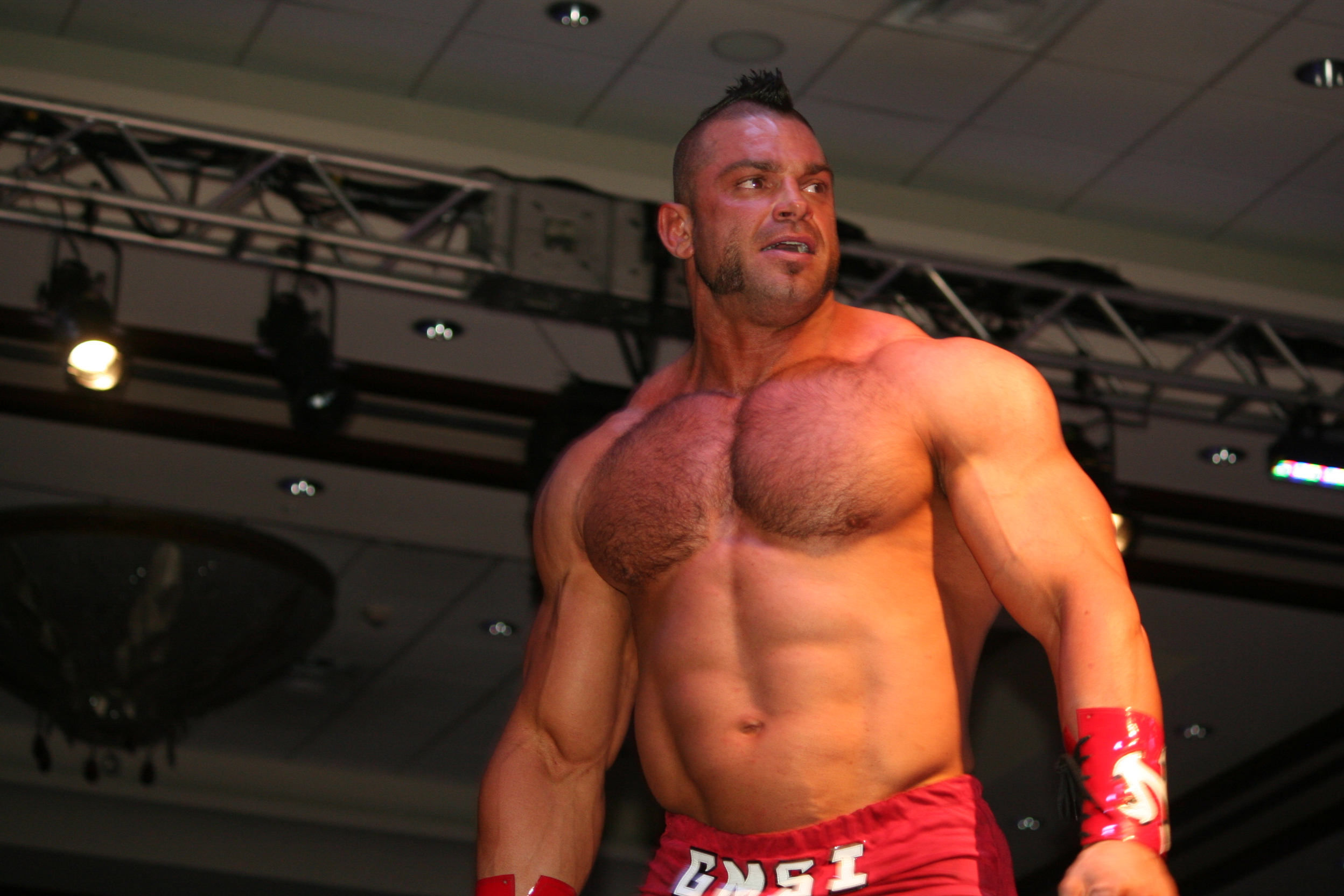 Le catcheur Brian Cage en 2017.